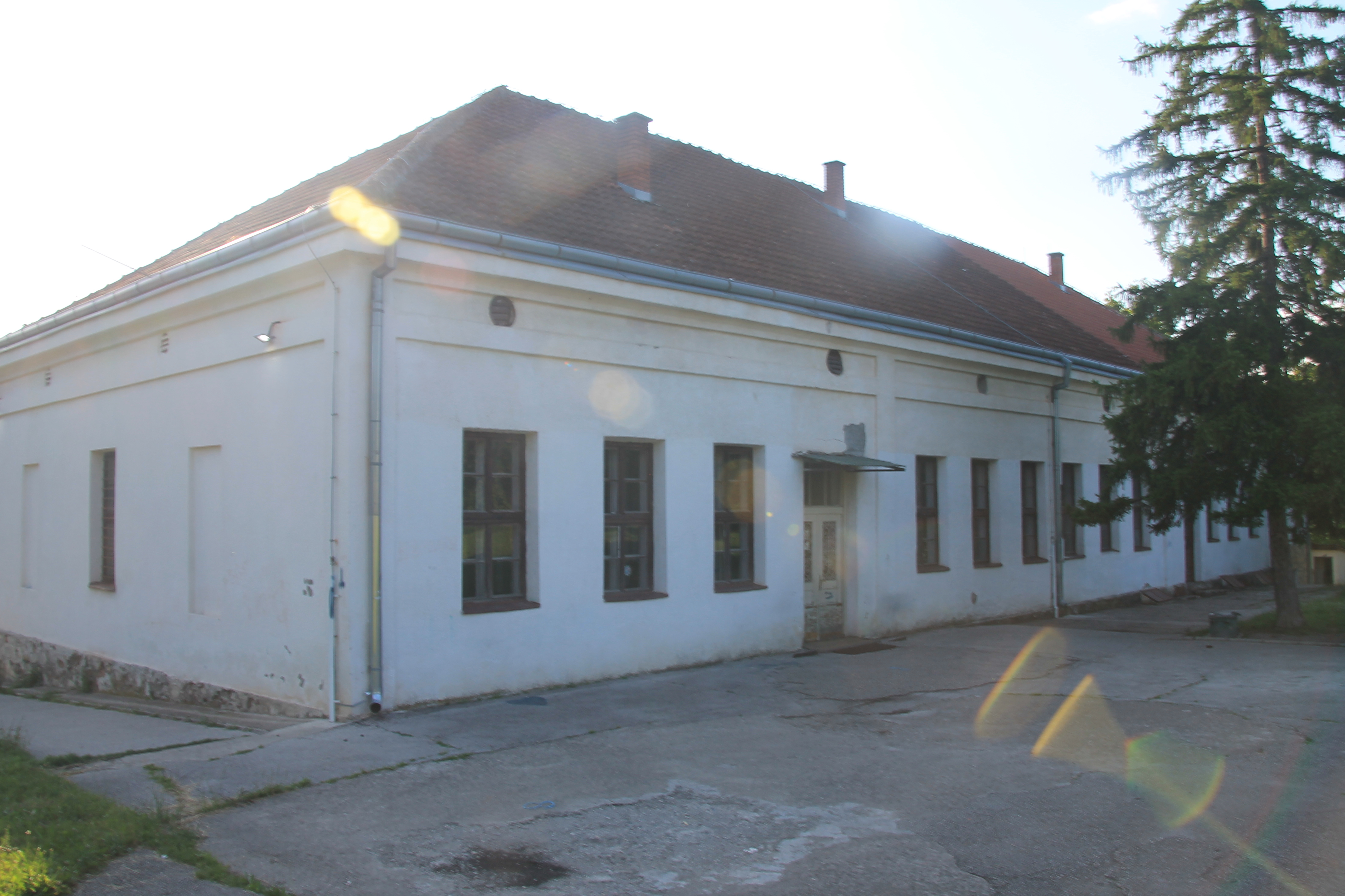 Brđani - škola